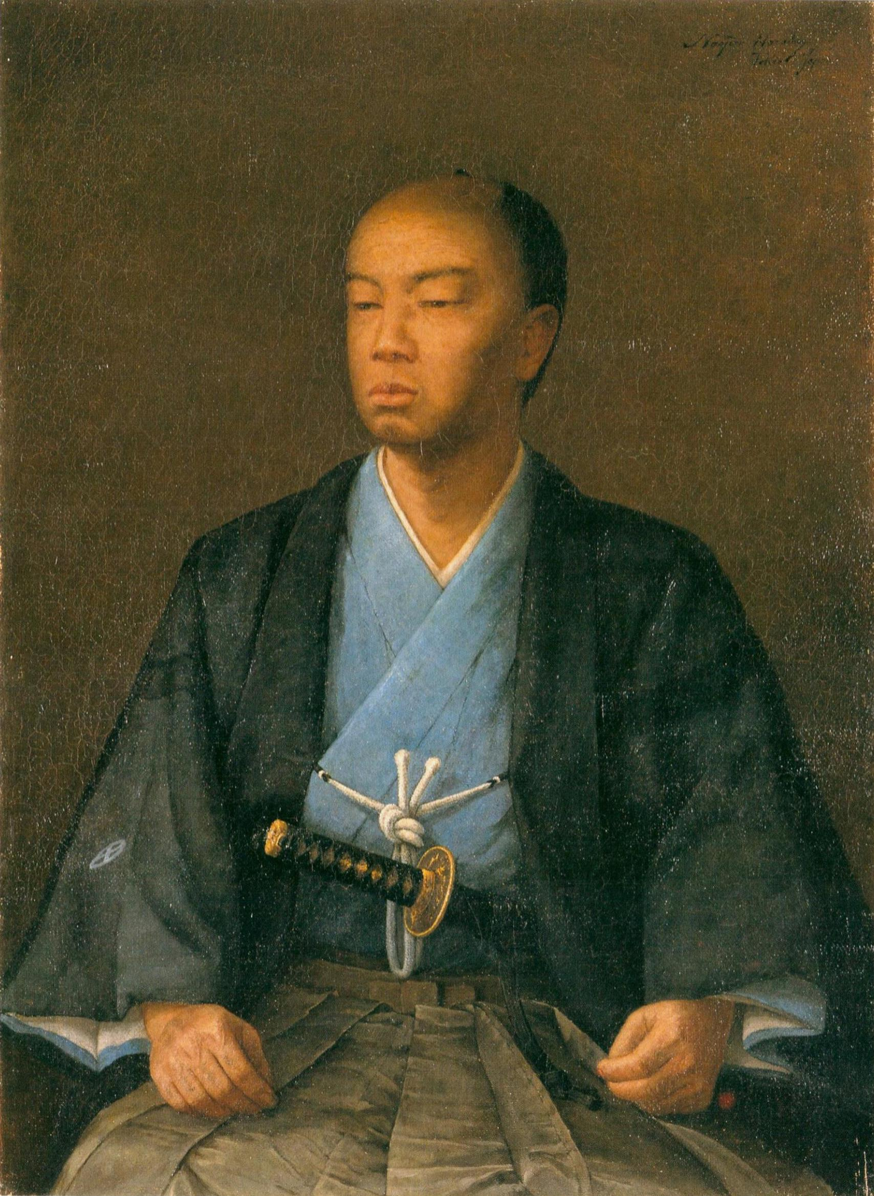 島津久光画像。薩摩藩最後の藩主島津忠義の実父。